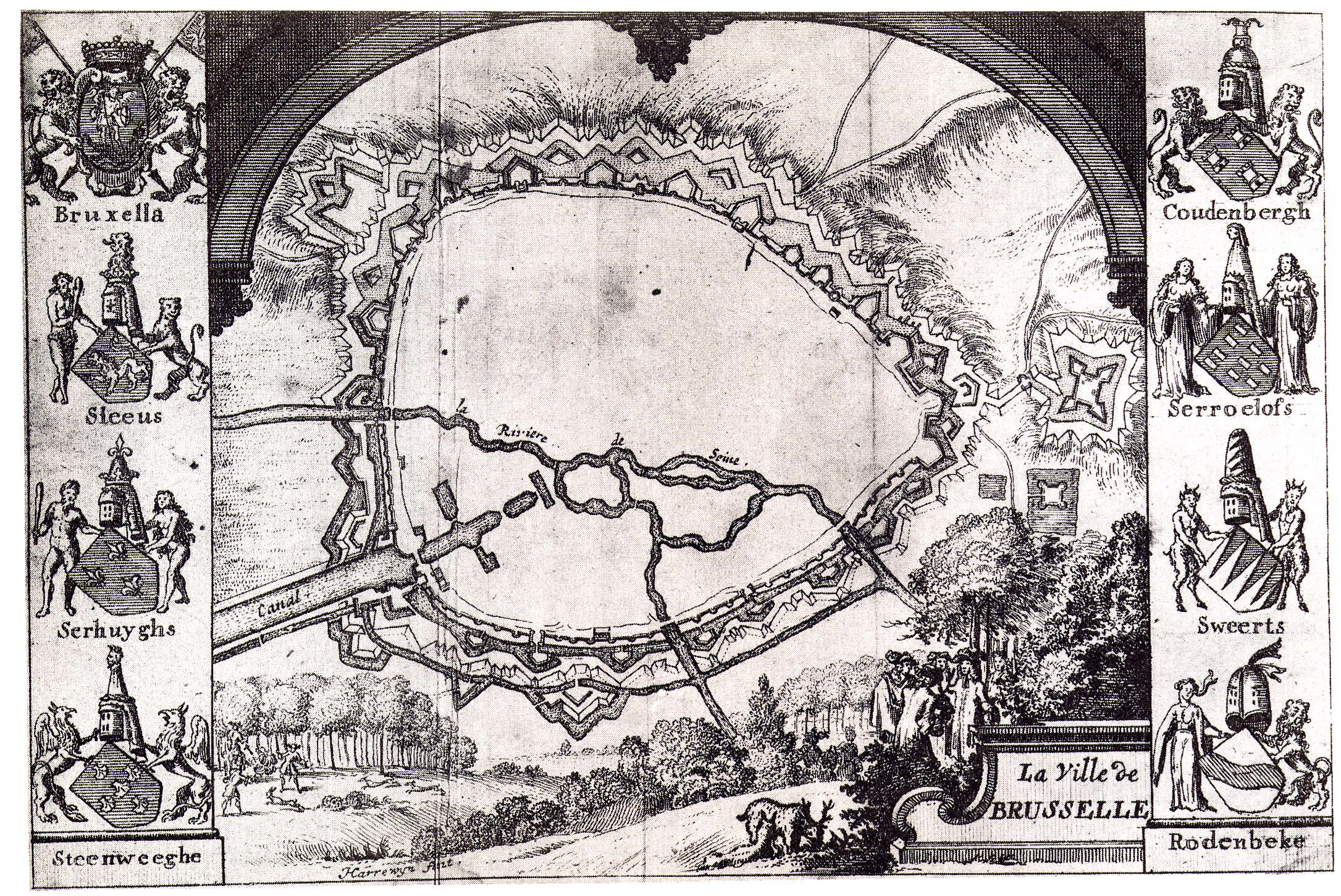 Les blasons des Sept Lignages de Bruxelles, carte gravée par Harrewijn